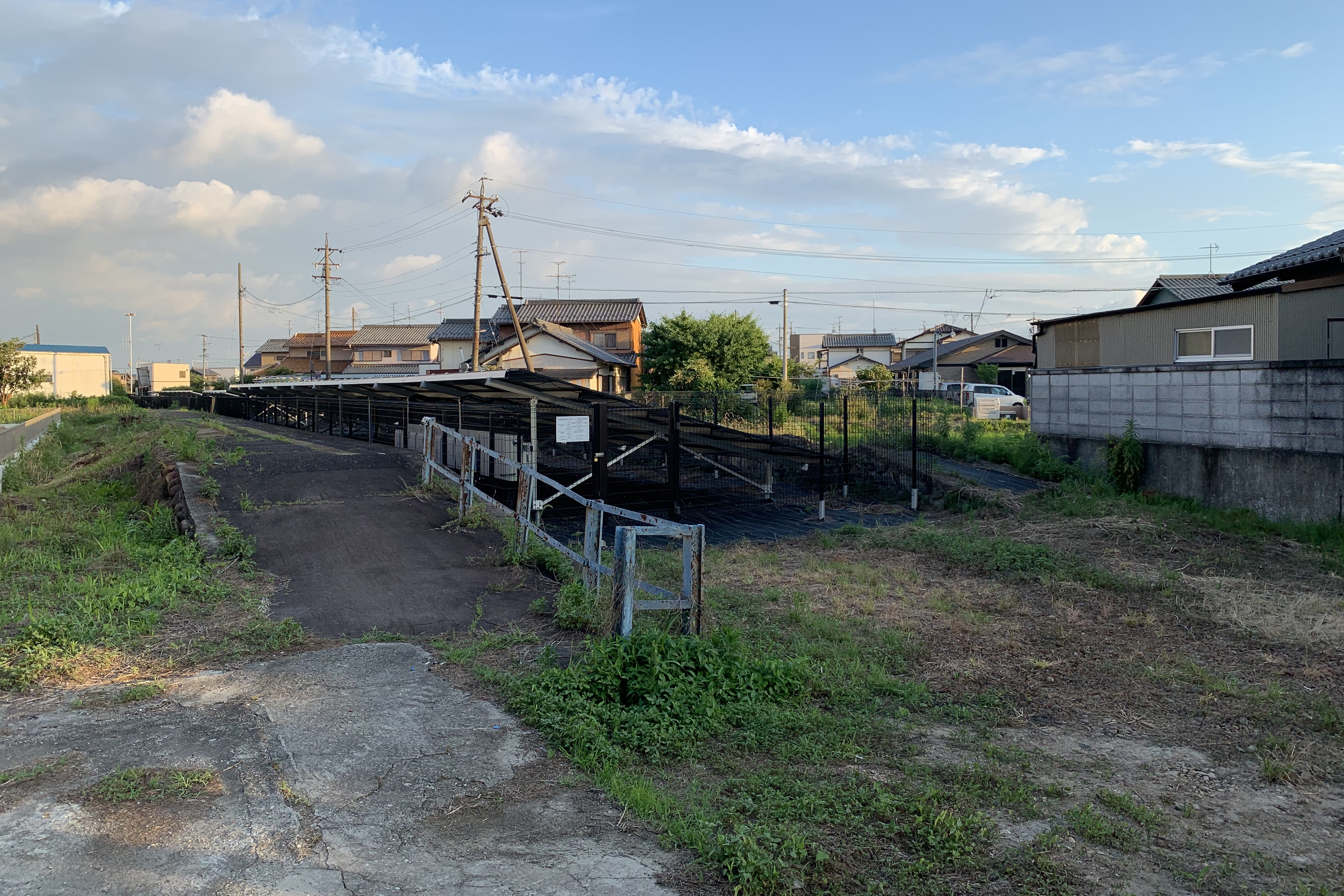 名鉄牧野駅跡（全景）